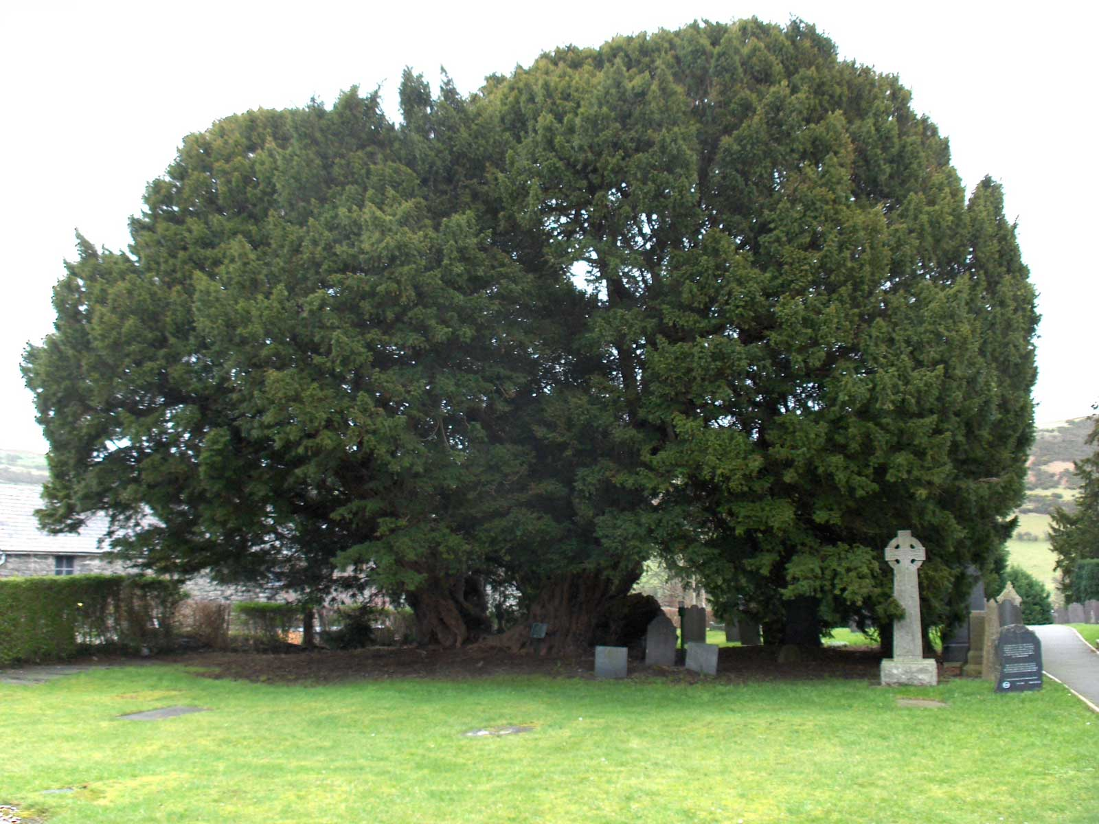 The Llangernyw yew tree, Llangernyw, Conwy, Wales